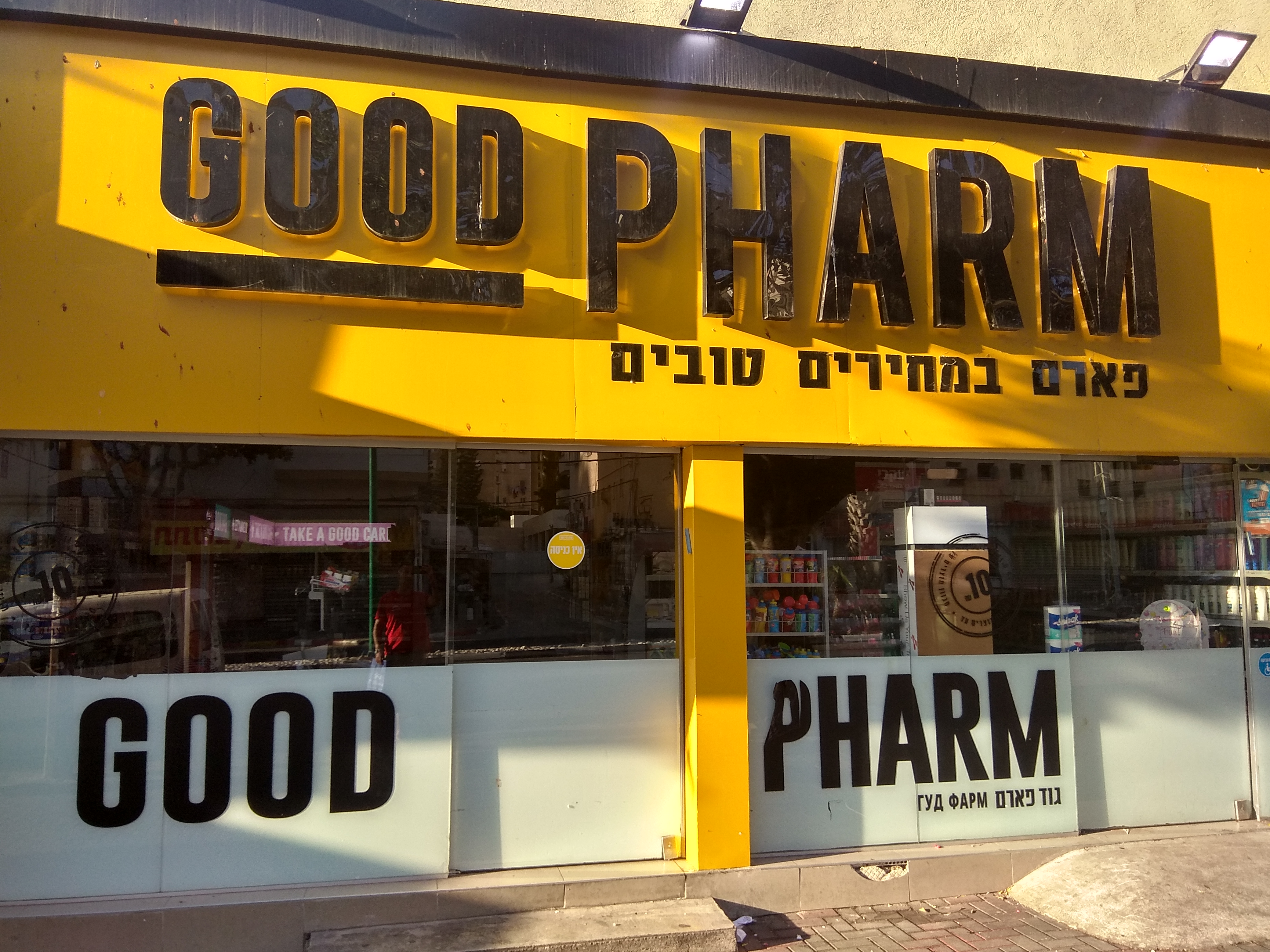 גוד פארם, סניף חדרה, 2018